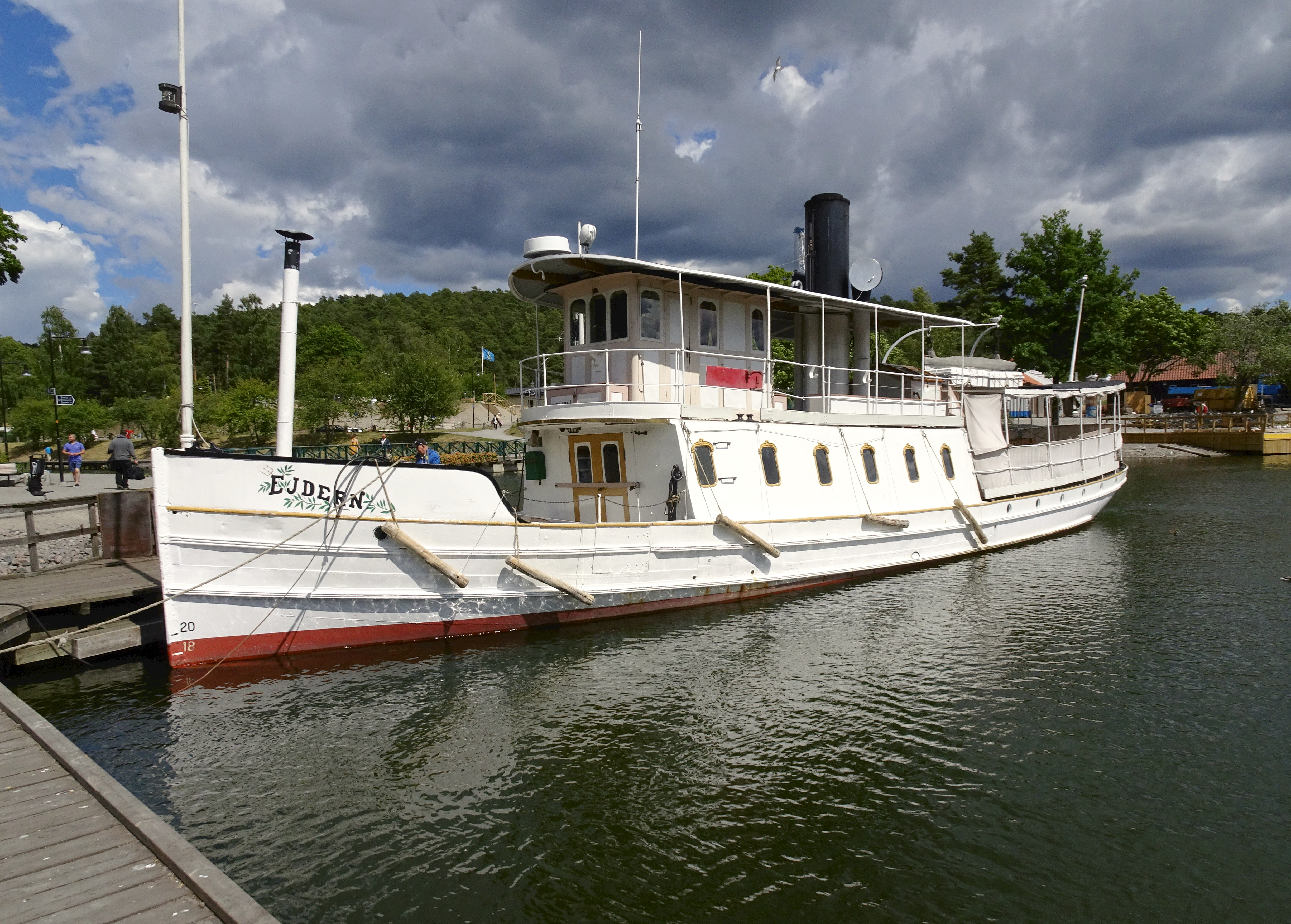 S/S Ejdern är världens äldsta koleldade propellerdrivna ångfartyg med originalmaskin. Ligger i hemmahamnen Södertälje. This is an image of a protected Swedish ship, with call sign SDVM .